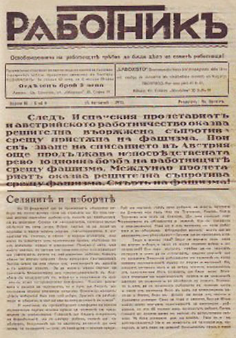 Вестник "Работник", наследник на синдикалния лист за организация и просвета “Работник”.